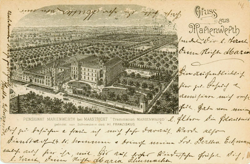 Prentbriefkaart verzonden in 1901 vanuit het Pensionaat Mariënwaard (Pensionat Marienwerth), destijds gemeente Meerssen, tegenwoordig Maastricht. Het landhuis Mariënwaard kwam in 1862 in bezit van Pierre Regout, die het omdoopte in "Grande Suisse". Later (vanaf 1875?) werd het eigendom van de zusters Franciscanessen van Nonnenwert (de Duitse tak van de Franciscanessen van Heythuysen), die er onder andere een meisjespensionaat begonnen. Het neogotische gebouw op de tekening is gesloopt. Collectie RHCL Maastricht, GAM 7456.